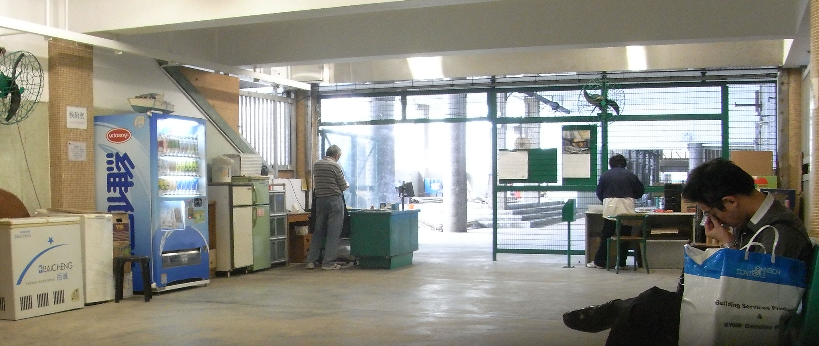 中文（香港）: 富裕小輪北角碼頭內景